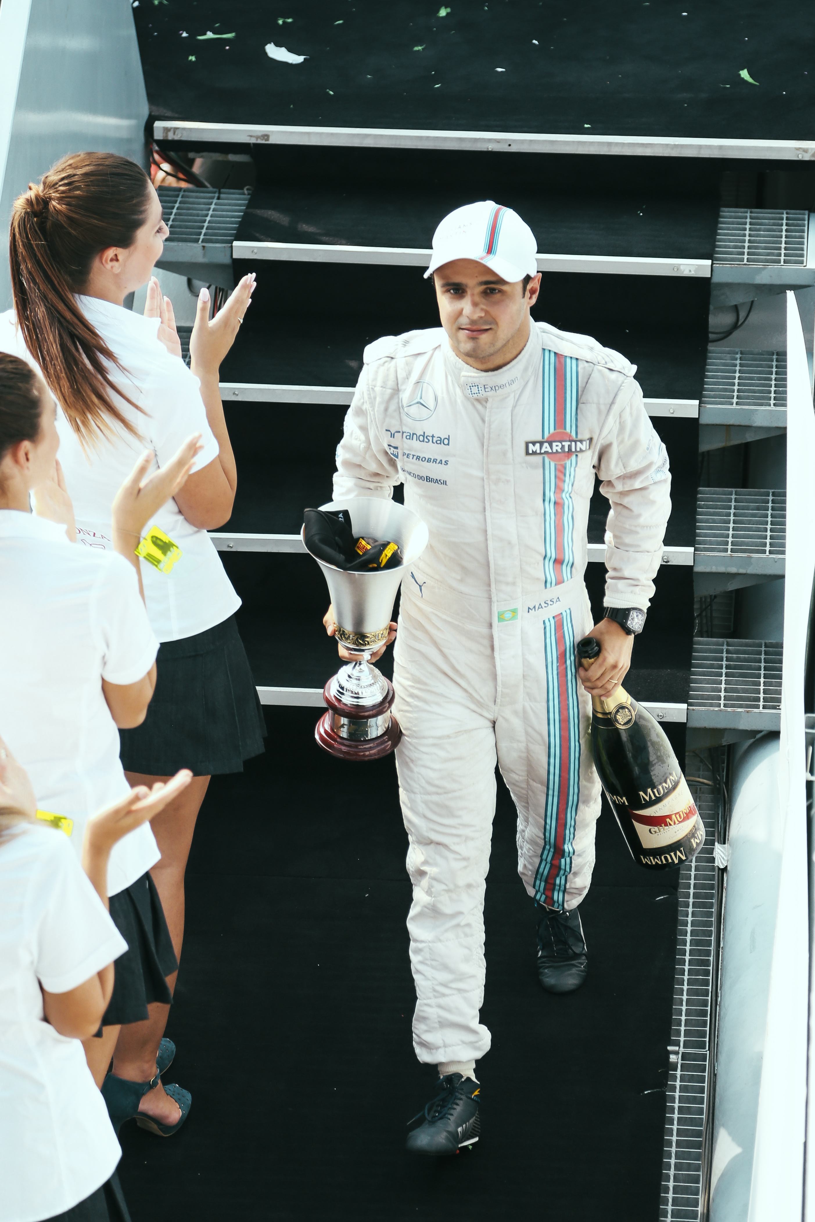 GP MONZA 2014